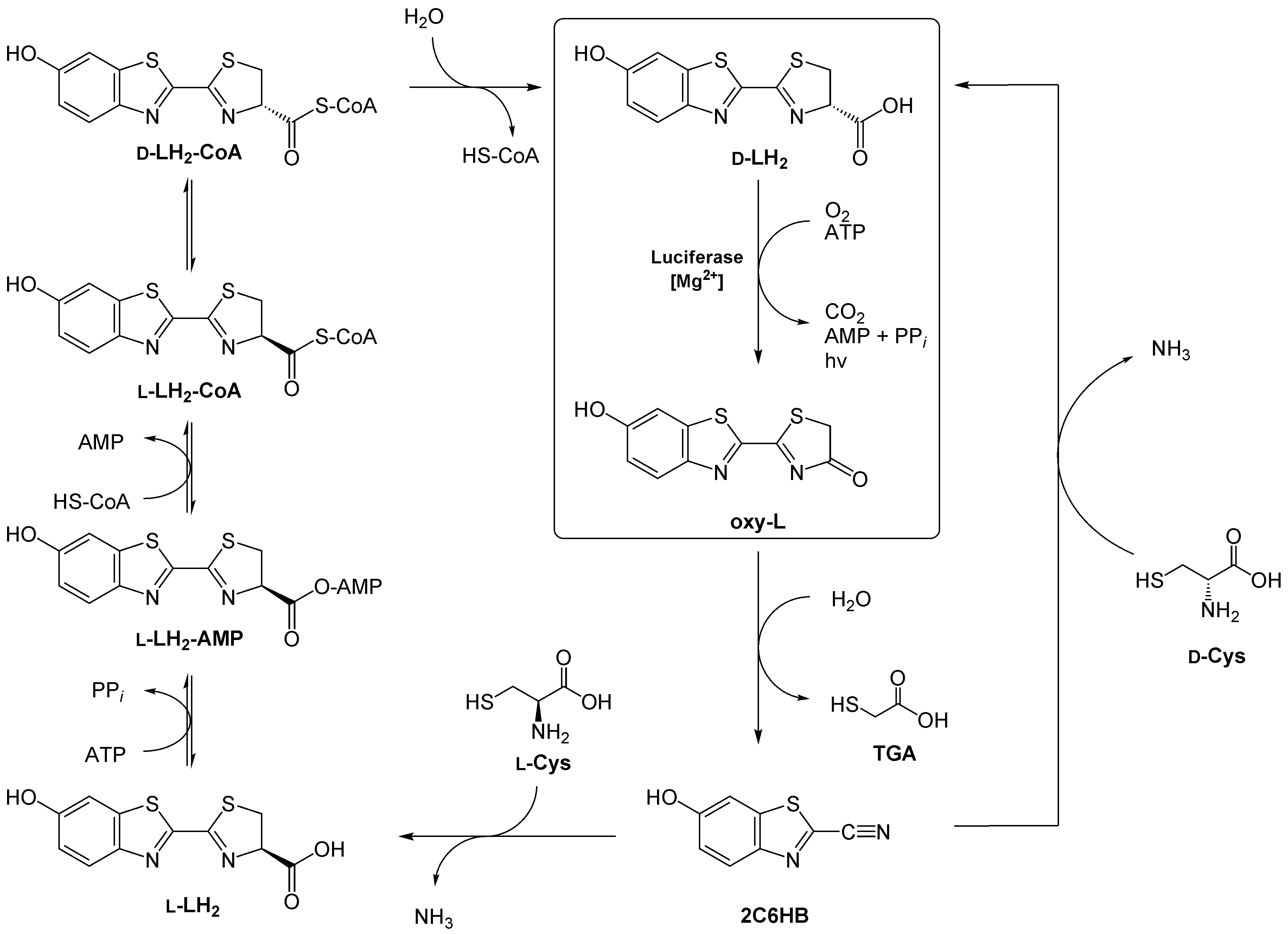 Reaktion und Regneration von Luciferin